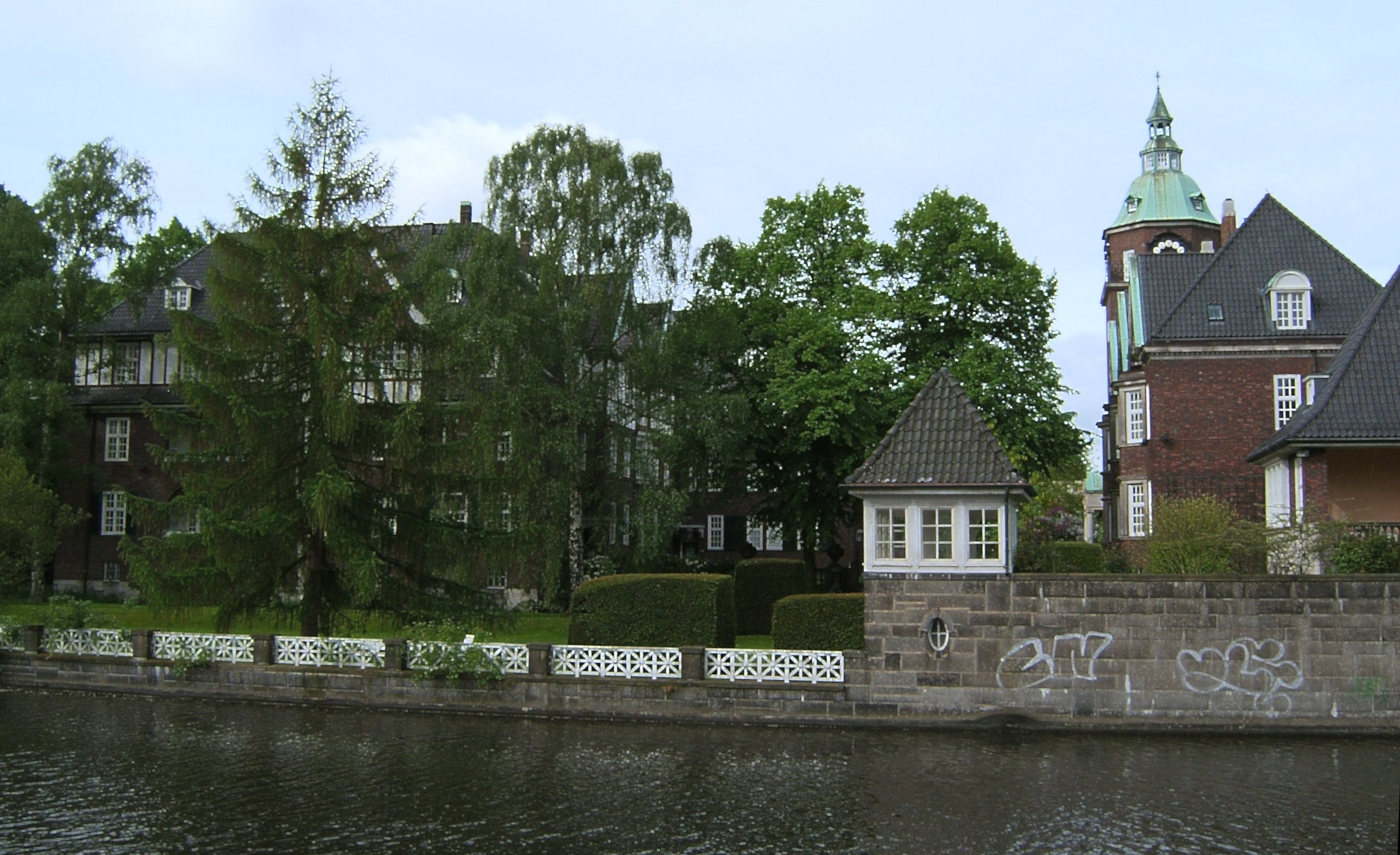 Blick vom Leinpfad in Hamburg-Winterhude über die Alster auf das evangelische Damenstift Kloster St. Johannis in Eppendorf, Heilwigstraße 150-162 This is a photograph of an architectural monument.